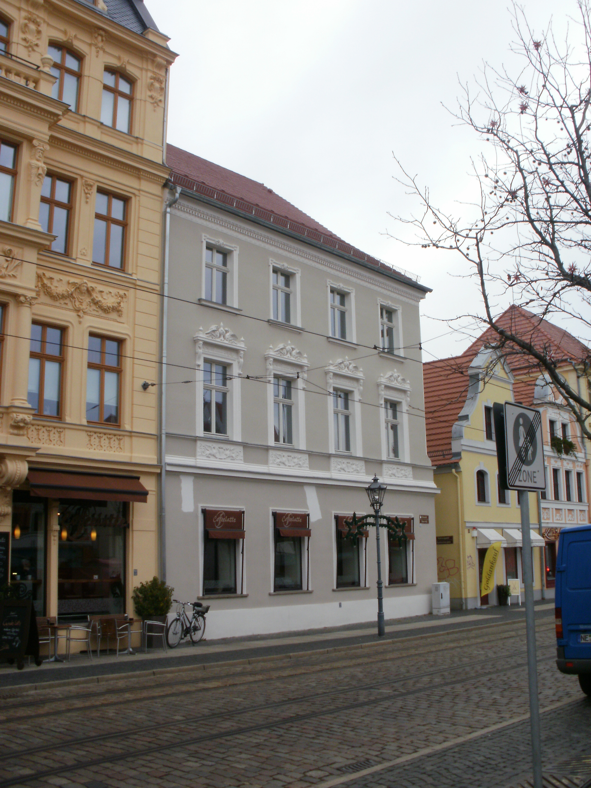 Atmarkt 13a, Cottbus